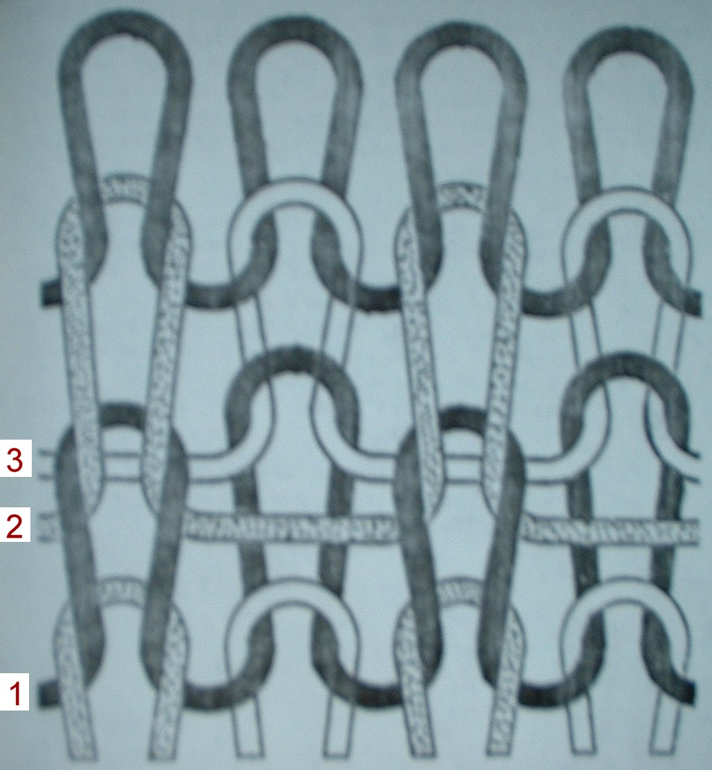 Maschenbild: Milano-Rib